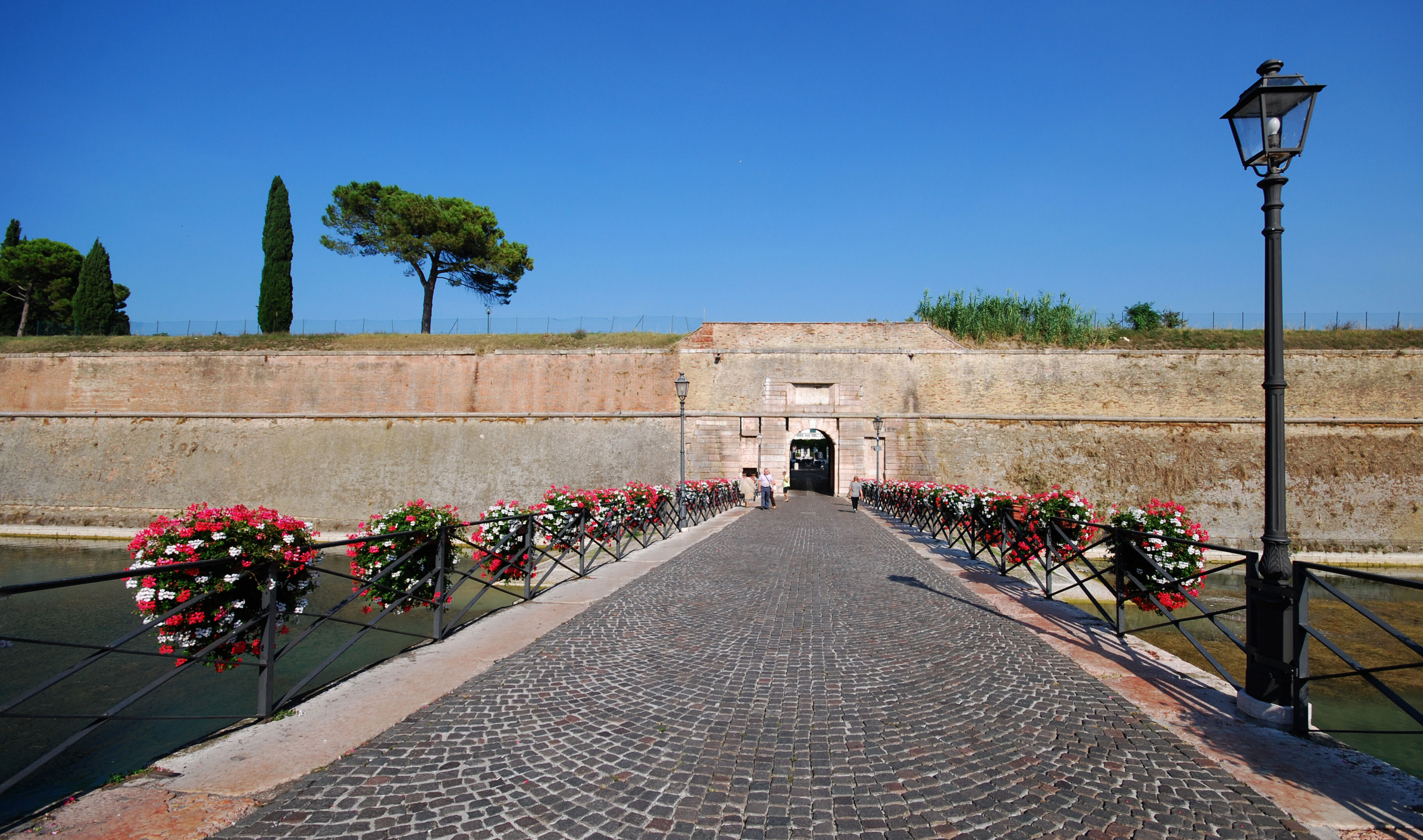 Porta Brescia This is a photo of a monument which is part of cultural heritage of Italy.